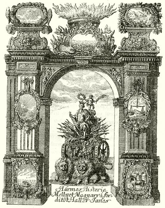 Haller, Hármas istoria,címlap, 1695